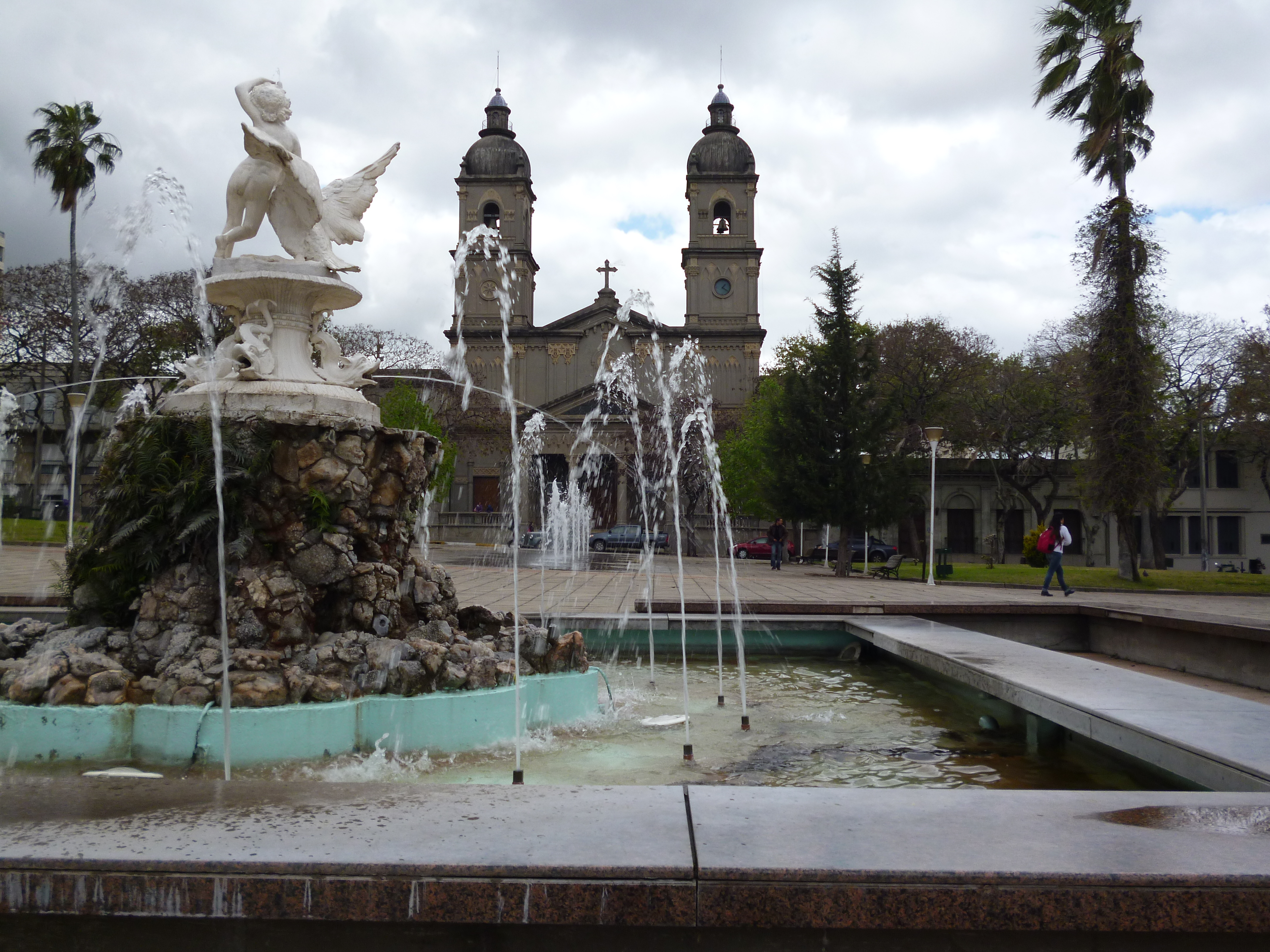 Plaza de los Treinta y Tres. Ubicada en el departamento de Salto